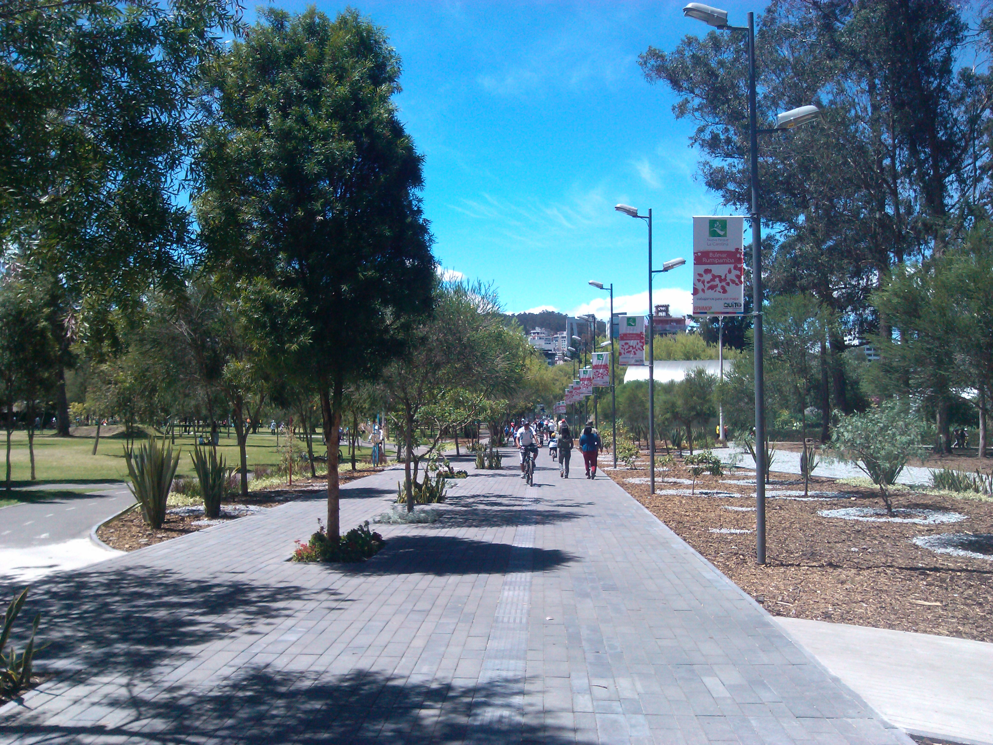 Bulevar Rumipamba (Parque La Carolina, Quito)